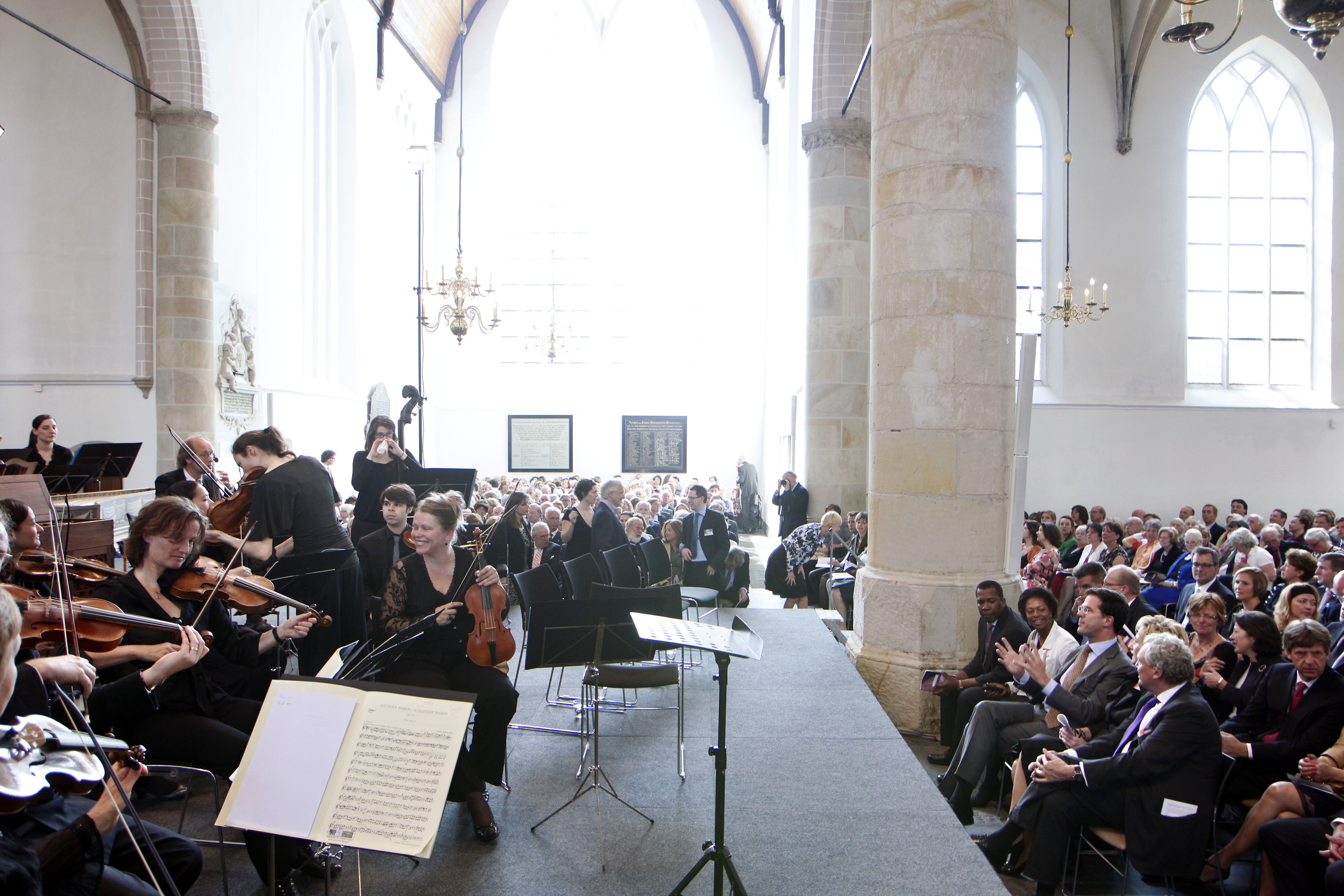 Minister-president Rutte geniet in het gezelschap van andere liefhebbers van de Matthäus-Passion in de Grote Kerk in Naarden.